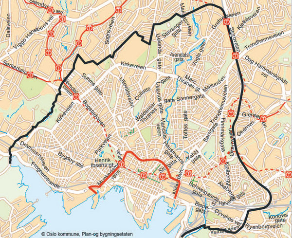 Grensen for indre by (i sort) og Ring 1 (i rødt), laget av Plan- og bygningsetaten i Oslo i 2012, basert på politivedtekt.